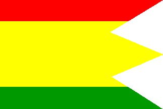 Dubinne Village -flag(Slovakia)